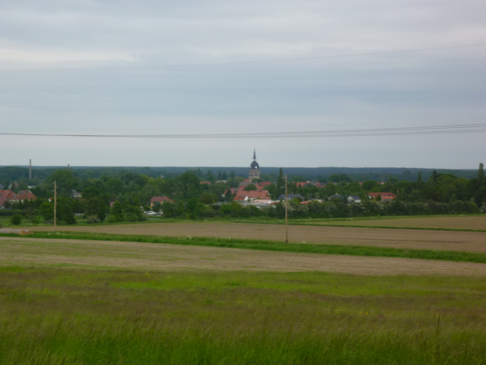 Calvörde, vom STrahlenberg aus gesehen